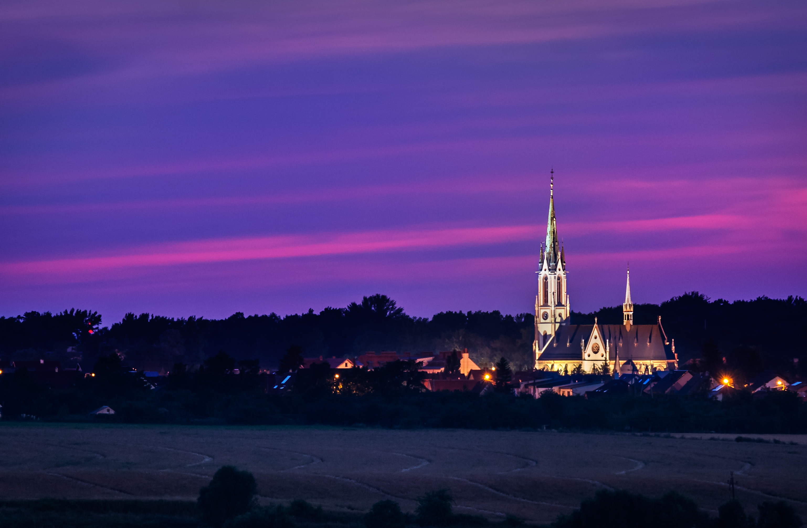 Pieszyce, ul. Ogrodowa - dawny kościół ewangelicki, ob. rzymskokatolicki kościół parafialny p.w. św. Antoniego, 1873